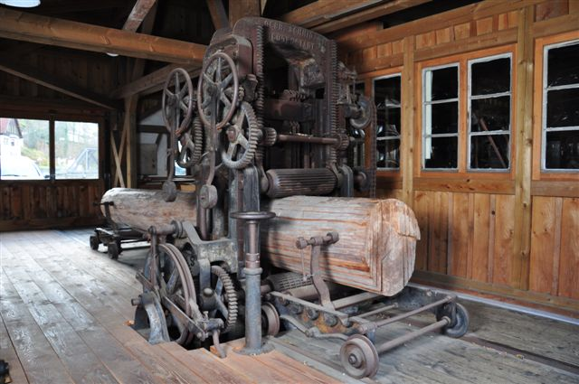 Hochgangsäge im Museum Schüttesäge, Schiltach. Angetrieben wird die Anlage über das Wasserrad des Museums.